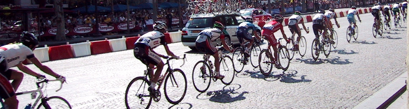 Tour de France 2004 - Zieleinfahrt auf den Champs-Elysées Quelle: selbst fotografiert Fotograf: Martin Zimmer Lizenzstatus: GNU FDL Hình:TourdeFrance.jpg